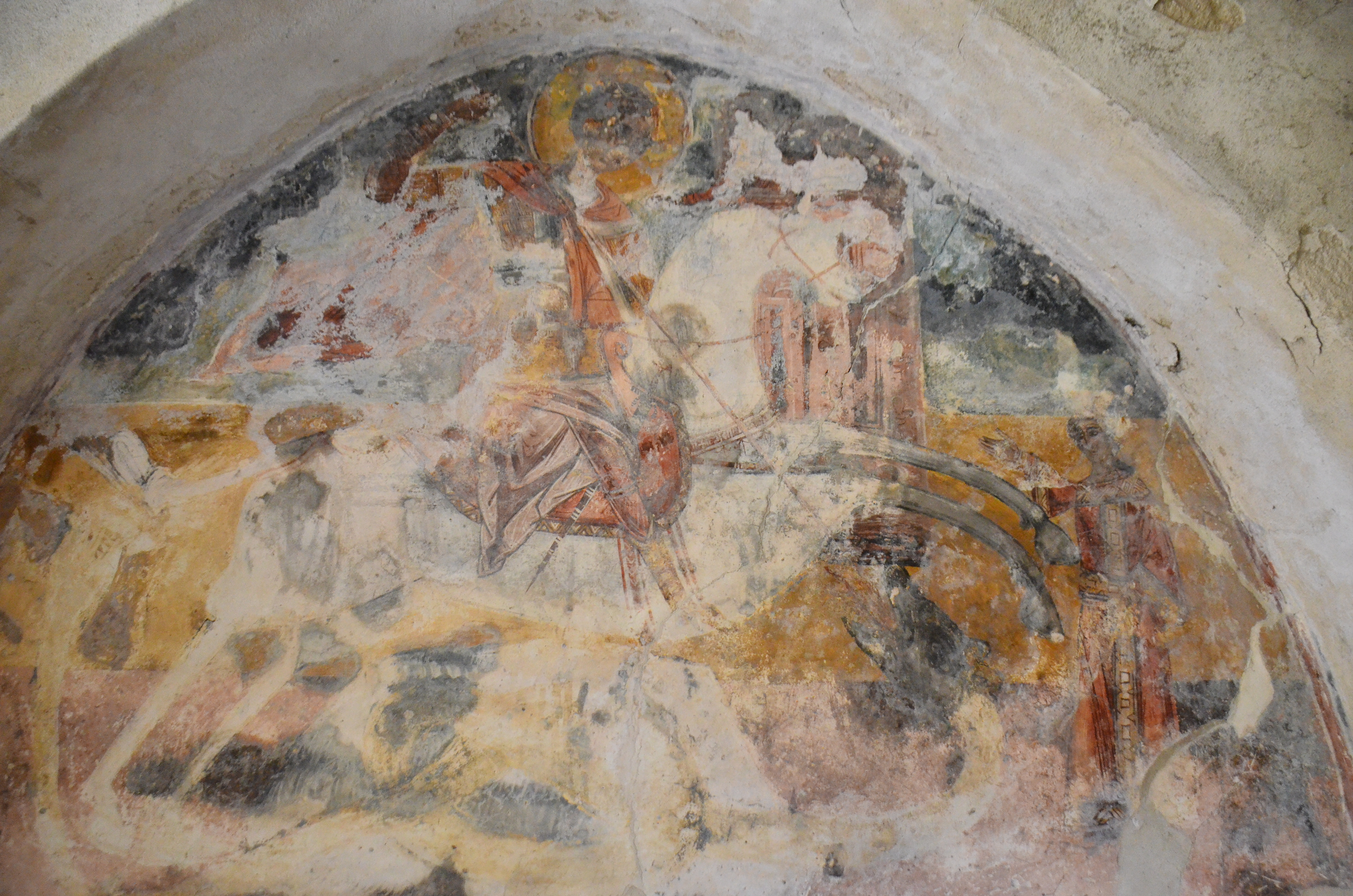 Црква Светог Ђорђа, село Врх, општина Краљево, Рашки округ